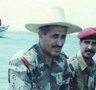 حميد القشيبي